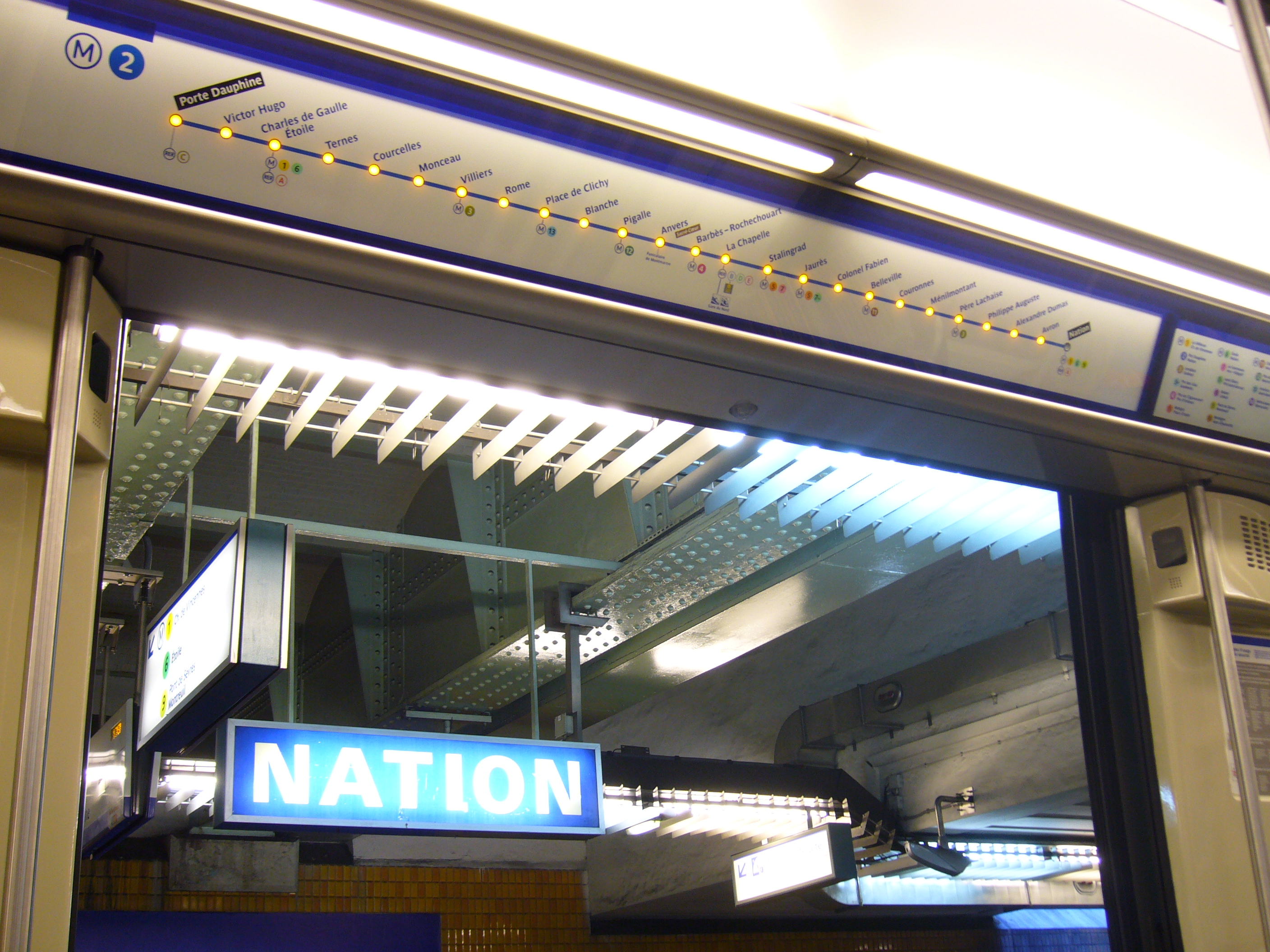 Station Nation sur la ligne 2 du métro de Paris vue depuis l'intérieur d'une rame MF 2000.